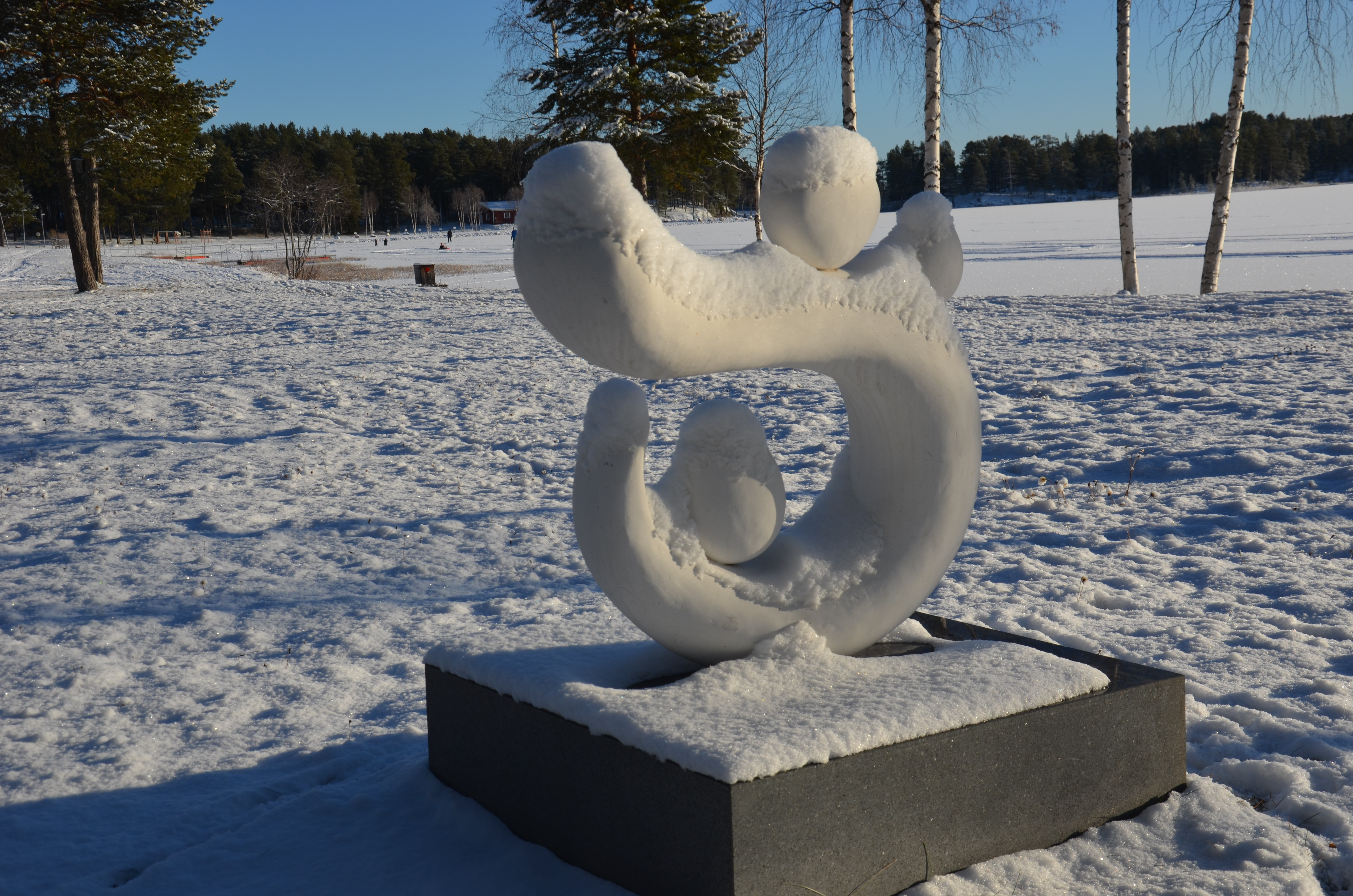 Folke Fjällströms skulptur "Balanskonstnären", Samiska skulpturparken i Jokkmokk